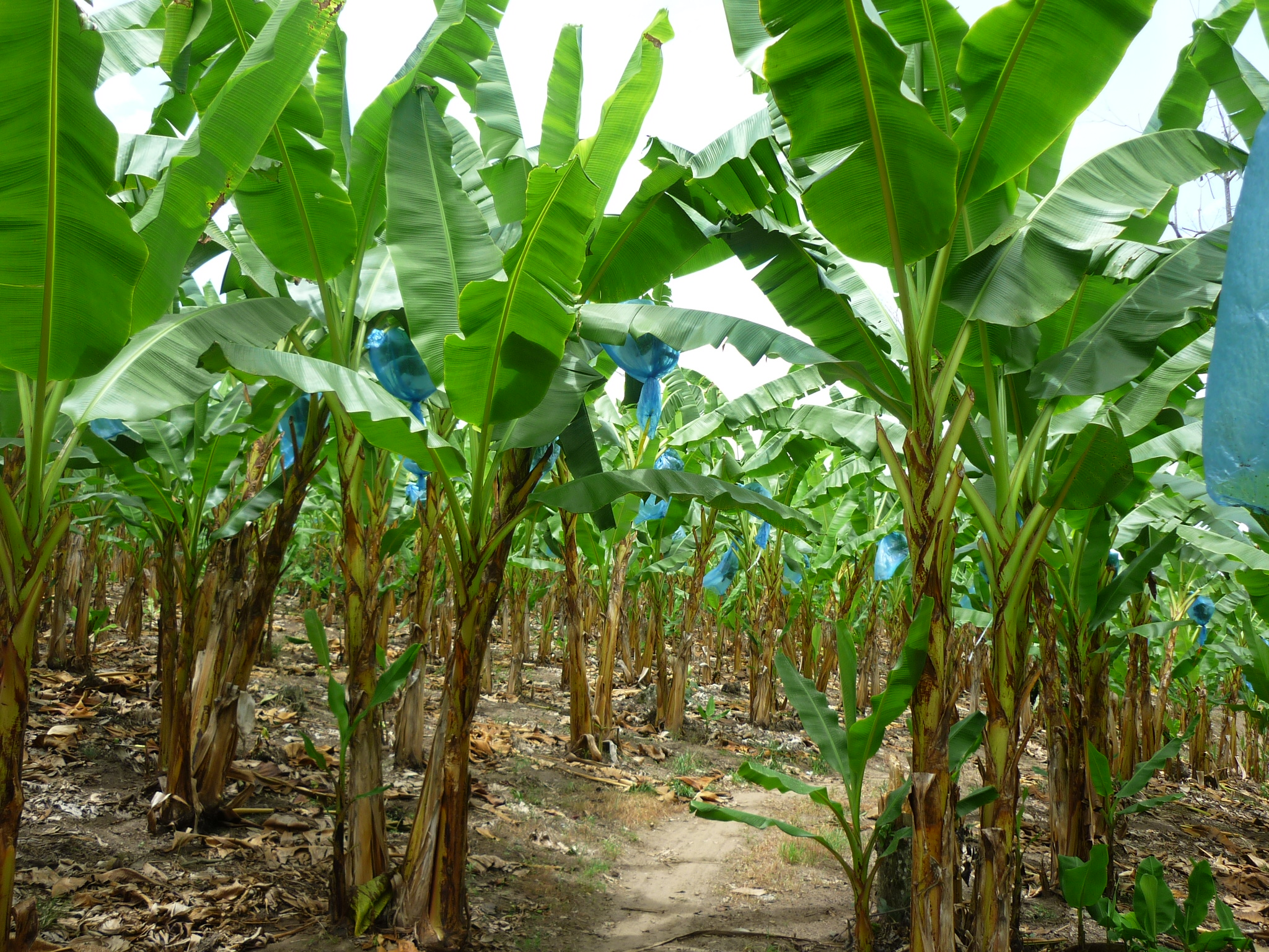 Tomada por Francisco Javier Arias Vargas, para comunicarse con el autor escribir a